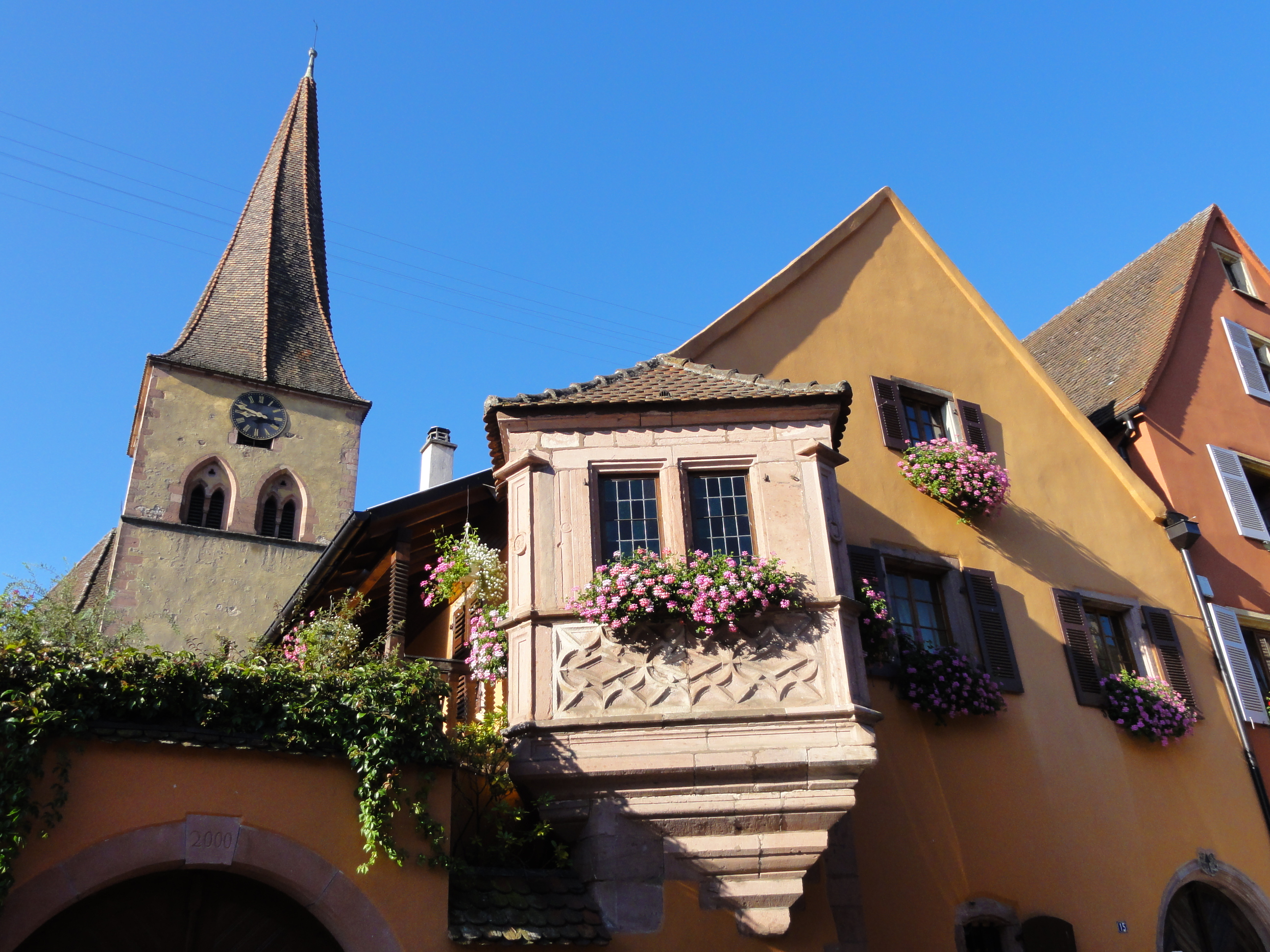 Alsace, Haut-Rhin, Église Saint-Gall (XIIIe-XIXe) de Niedermorschwihr (PA00085766, IA68003994).